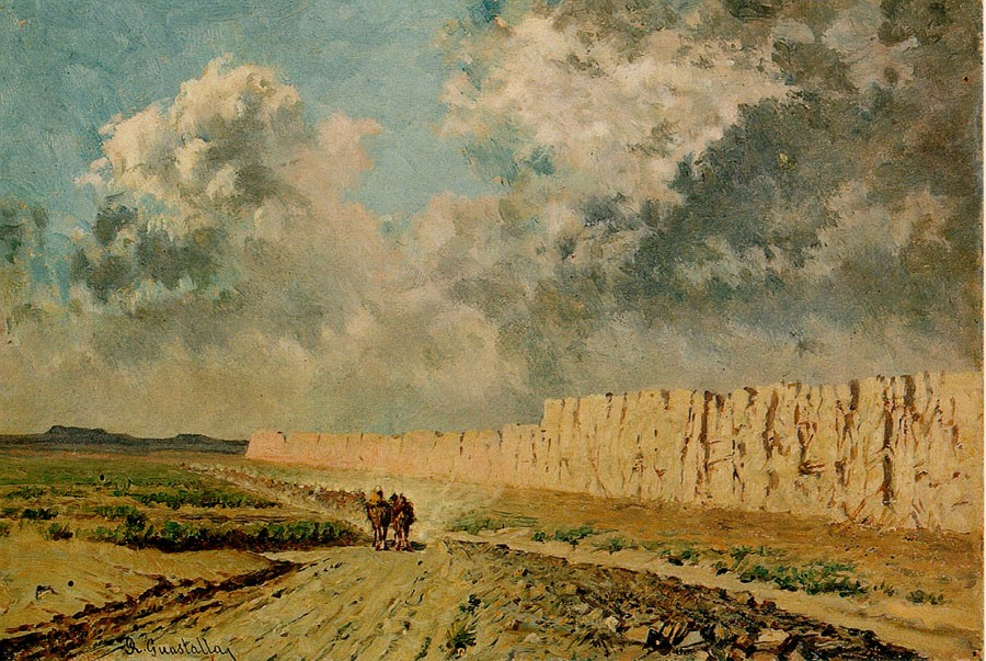 "Paesaggio roccioso con colonna di cammellieri", olio su cartone di Roberto Guastalla (c/o Museo Fondazione Cariparma, Parma)